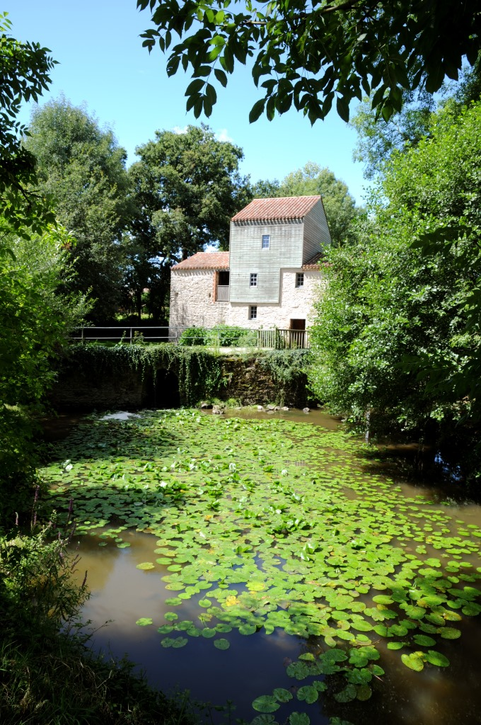 L'Yon et le Moulin de Rambourg - Photo : La Roche-sur-Yon Agglomération - J. Auvinet